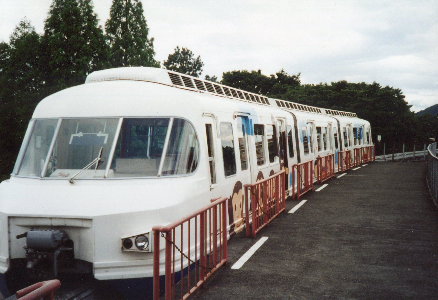 白カラー時代